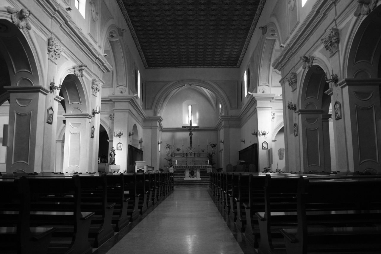 interno della cattedrade dell'Annunziata di Tursi